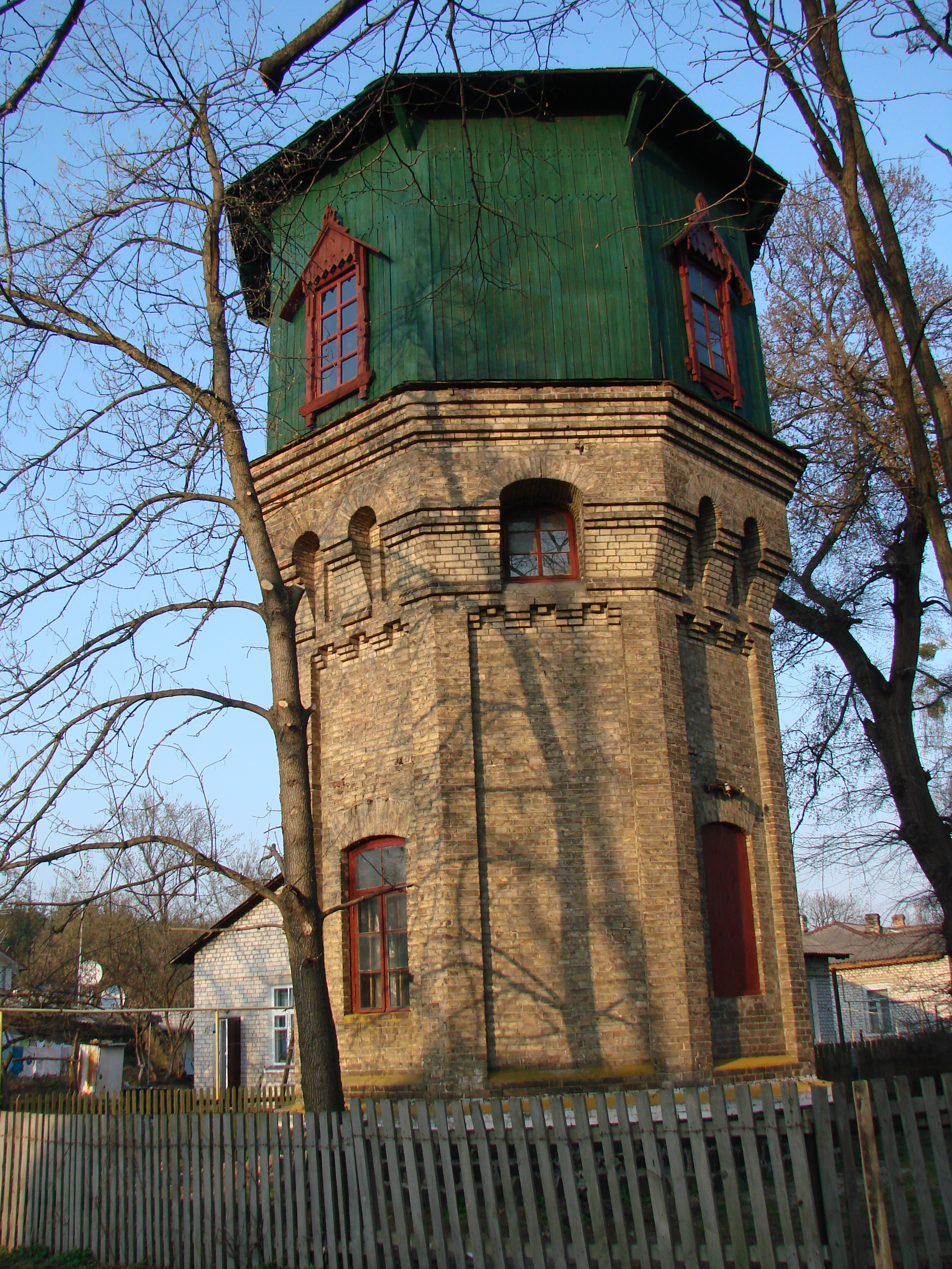 Водонапірна башта ст.Пісківка 190х року